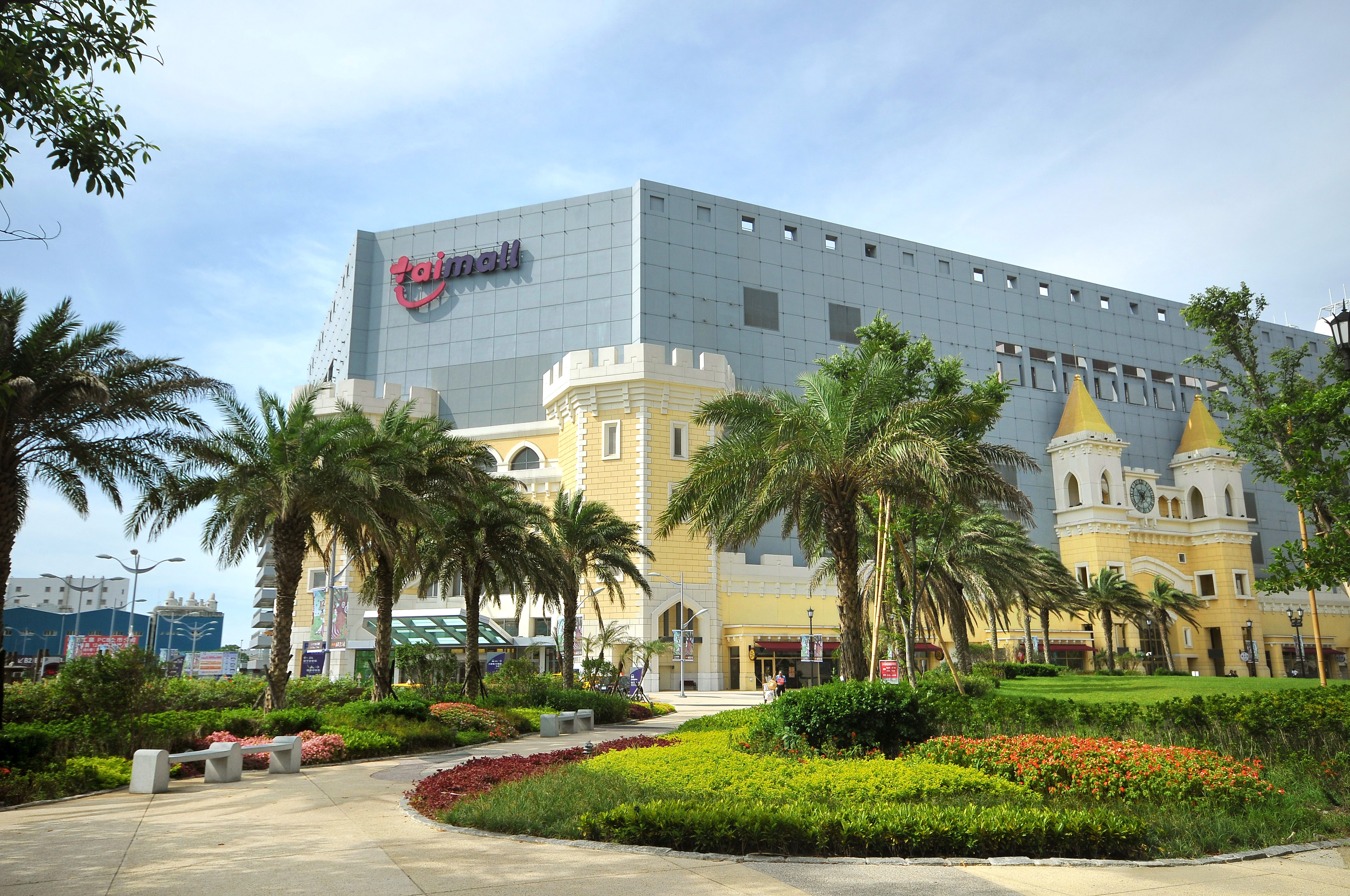 台茂購物中心_日景